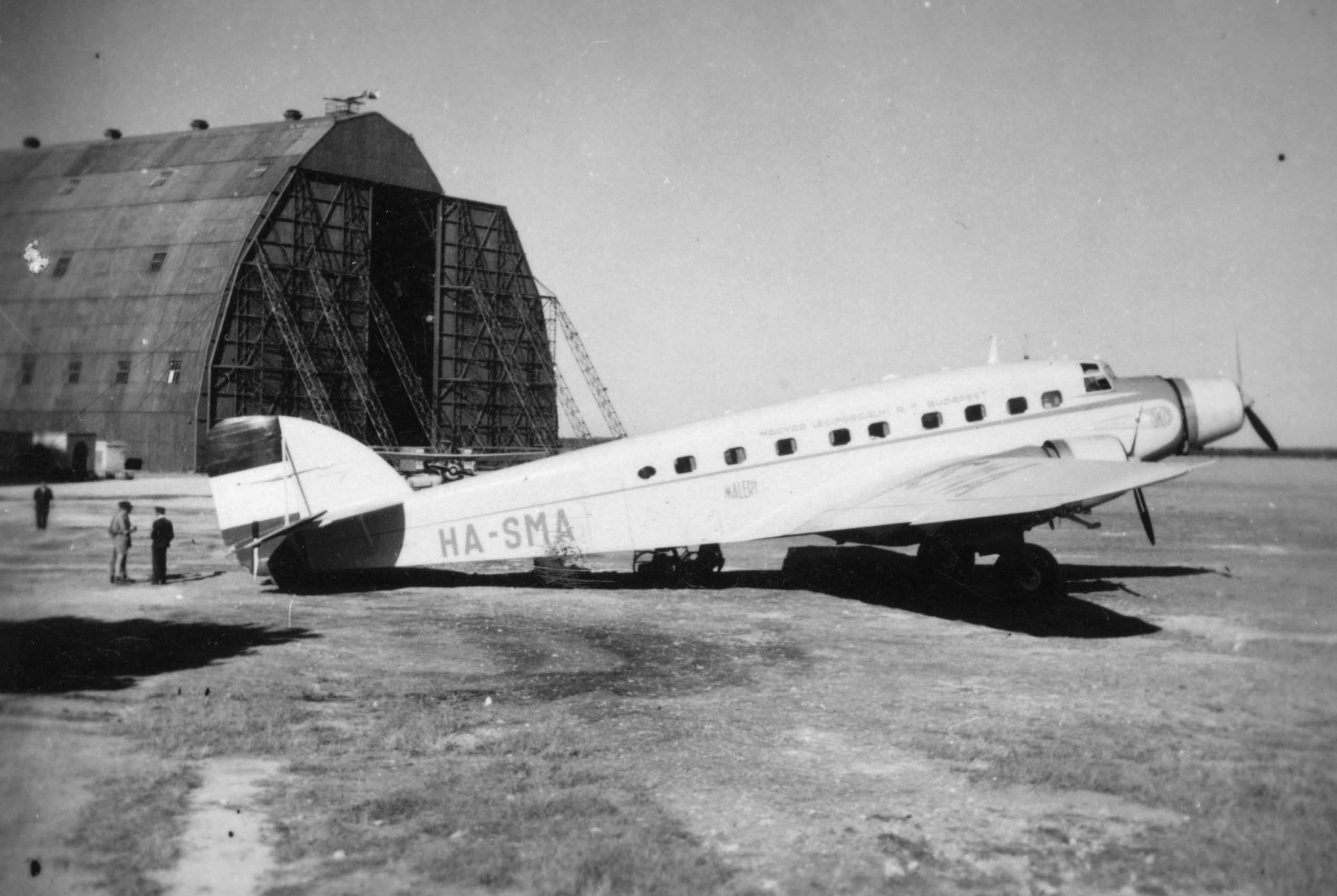 repülőtér, a Malert Savoia - Marchetti SM-75 utasszállító repülőgépe. Location: Italy, Grottaglie Tags: Savoia-Marchetti brand, airplane, airport, transport, Italian brand Title: repülőtér, a Malert Savoia - Marchetti SM-75 utasszállító repülőgépe.